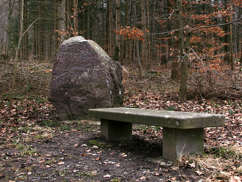 Gedenkstein für den Schweizer Schriftsteller Jakob Bosshart in Zürich (Nähe Hotel Dolder). Inschrift: "Zur Erinnerung an den Dichter Jakob Bosshart 1862-1924".